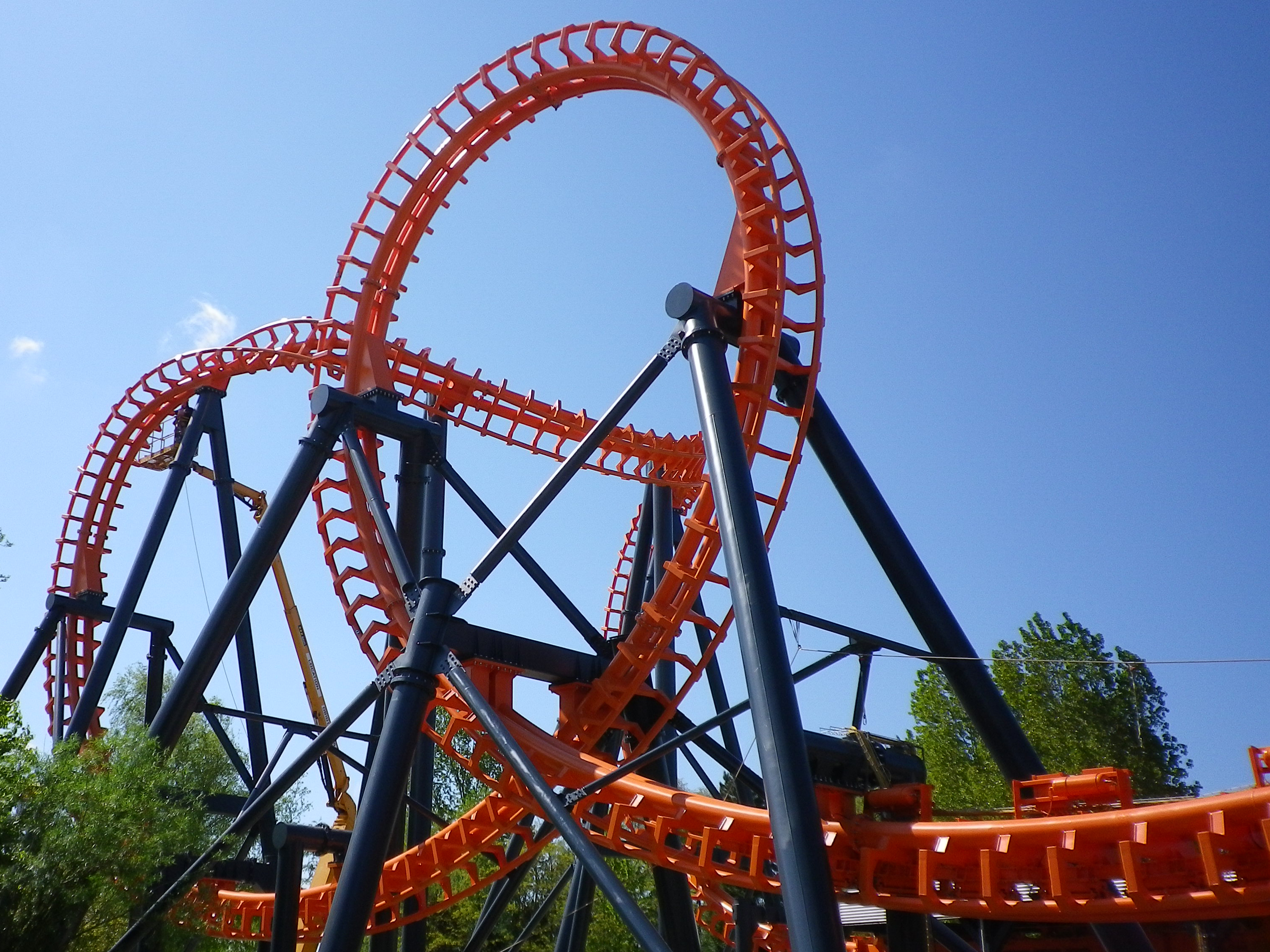 Triops-Nouveauté 2012